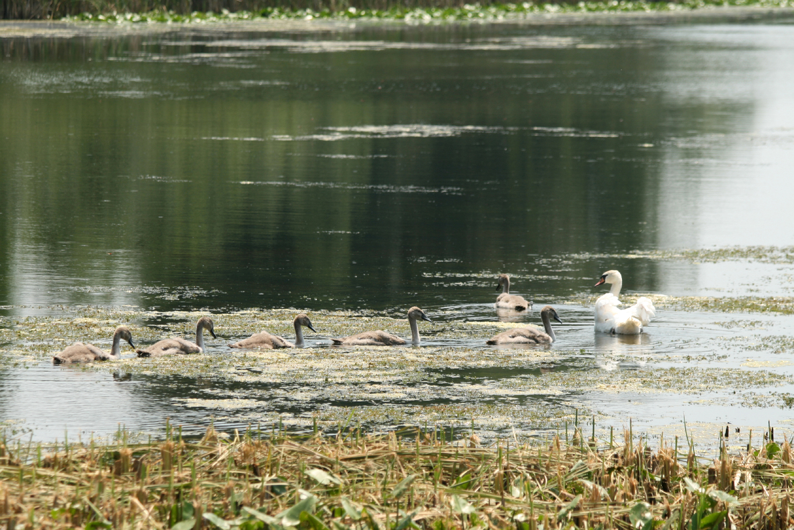 Oiseau dans la rivière Zasavica